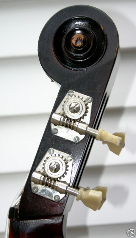 sistema de clavijas de afinacion de Zorko